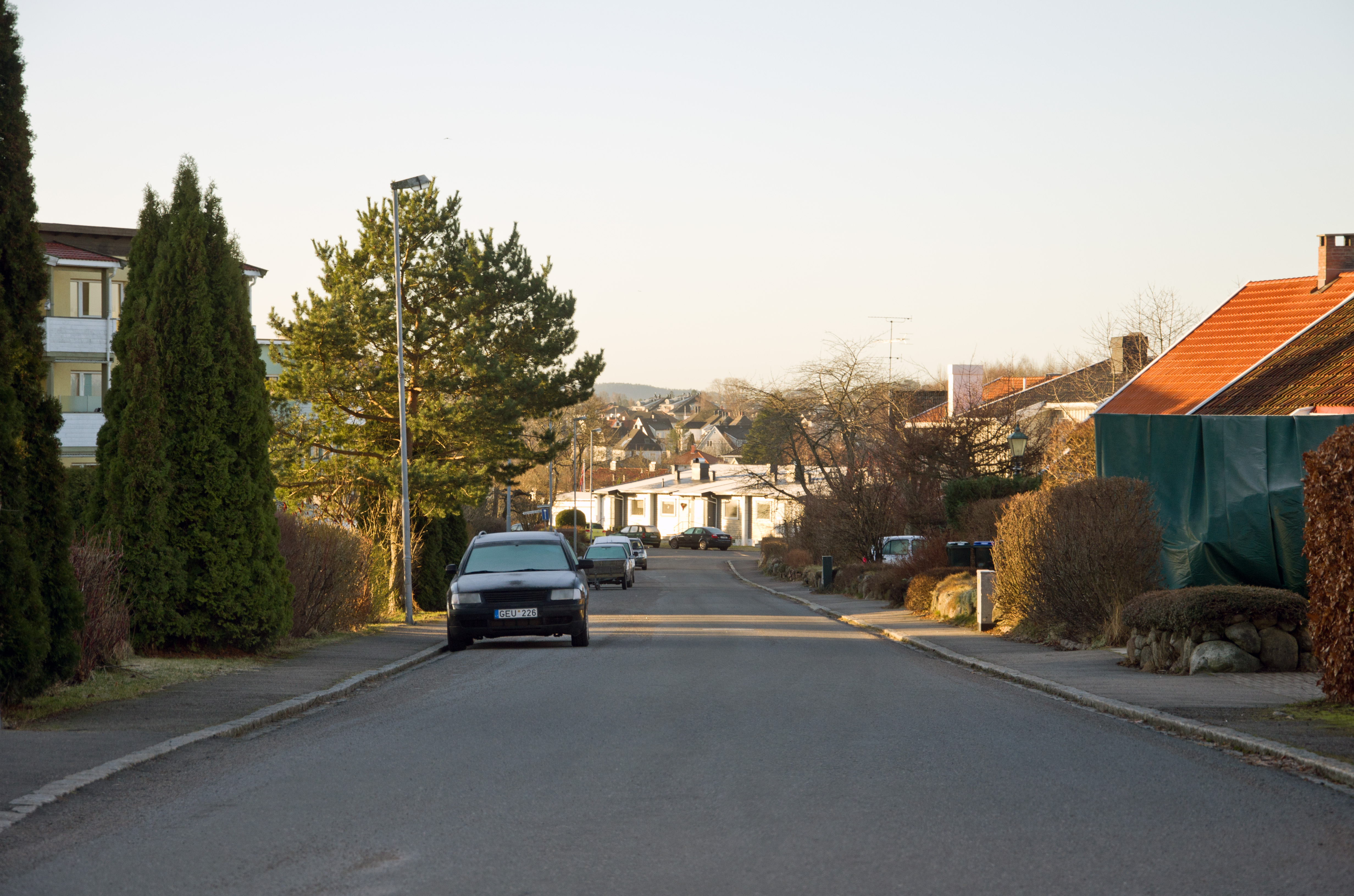 Bjørnsons vei, Tønsberg